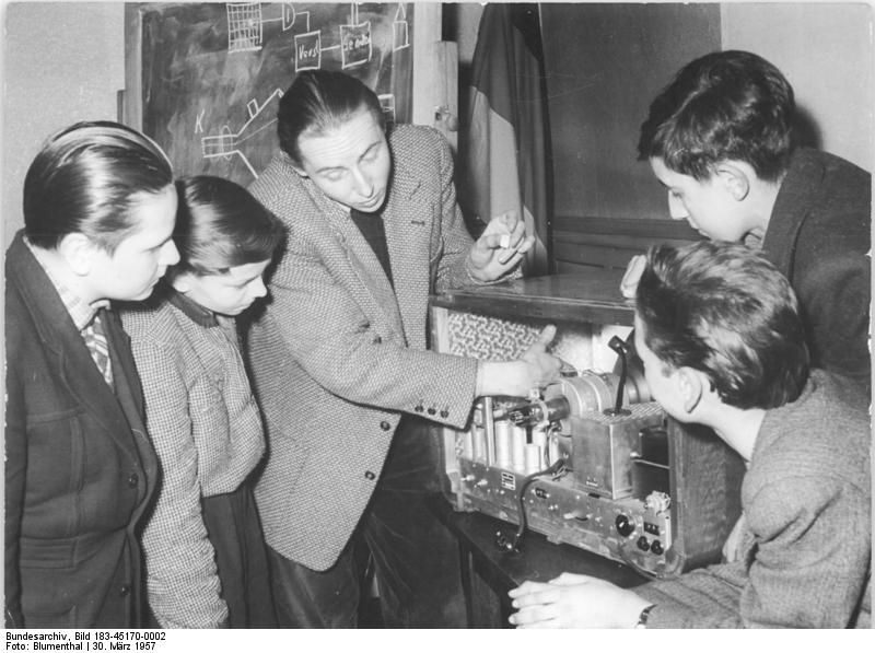 Erfurt, Jugendstunde im Fernmeldeamt Zentralbild Erfurt 30.3.1957 Blumenthal Eine Jugendstunde im Fernmeldeamt Erfurt "Wir hören und sehen-ohne dabei zu sein", so lautete das Thema einer Jugendstunde der Grundschulen 4 und 21 in Erfurt am Freitag, dem 29.3.1957. Die Jugendstunde wurde im Fernmeldeamt Erfurt, dem Patenbetrieb der Grundschule 21, abgehalten. Hier wurden die Jugend und Mädchen vom Sachbearbeiter des Amtes, Günter Kaufhold, in die Technik des Fernsehens eingeführt. Anschliessend konnten sie das abendliche Fernsehprogramm verfolgen. UBz: Ein Blick in das Innere des Fernsehgerätes "Rembrandt" interessierte besonders die Jungen. V. l. n. r.: Die Schüler Bern Güllmar, Imo Schiffmann, der Sachbearbeiter des Fernmeldeamtes Günter Kaufhold und die Schüler Lothar Grossmann und Franz-Werner Schössler.